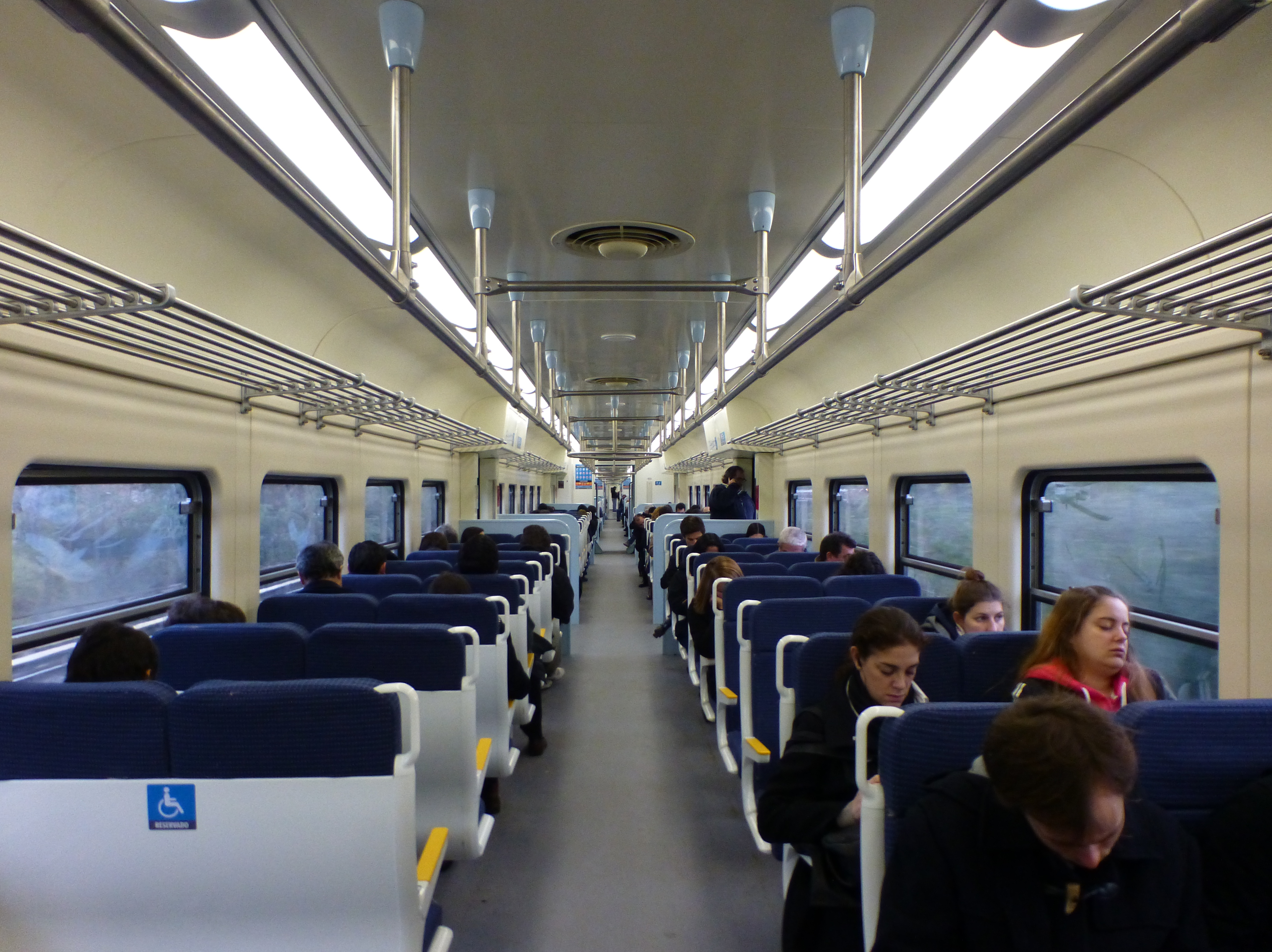 Interior de coche clase única para tracción diésel fabricado por la estatal china CSR para el FCGSM en servicio de emergencia en el Ferrocarril General Mitre de la red ferroviaria argentina.